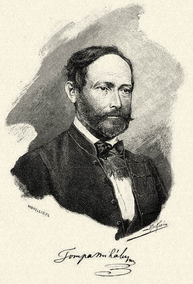 Tompa Mihály. Morelli Gusztáv fametszete. Megjelent Az Osztrák-Magyar Monarchia írásban és képben (1887–1901) kiadványban